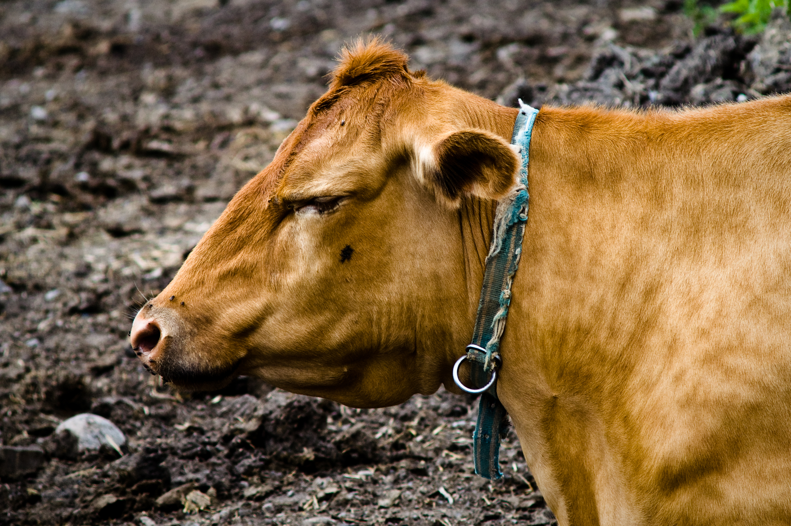 calm as a cow